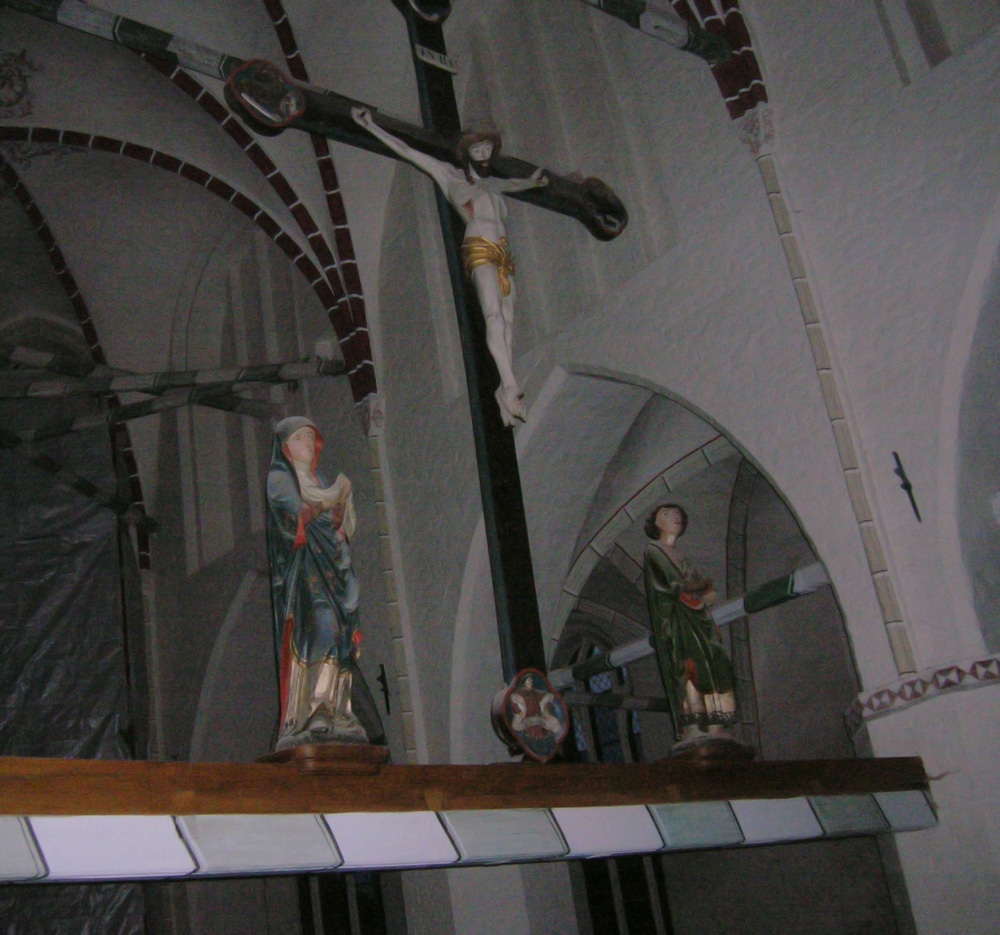 Triumphkreuzgruppe im Chor der Gadebuscher Stadtkirche